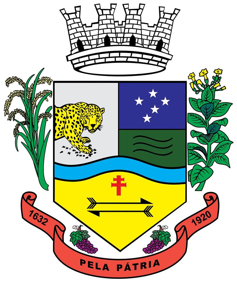 Brasão representativo do munícipio de Jaguari, localizado no estado brasileiro do Rio Grande do Sul.